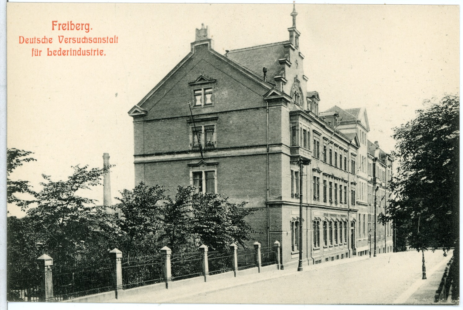 Freiberg; Deutsche Versuchsanstalt für Lederindustrie This postcard is from publisher Brück & Sohn in Meißen ( postcard has a unique number 10976 and is available in a higher resolution at the publisher. This images was uploaded in a cooperation project between Wikipedians and the publisher.